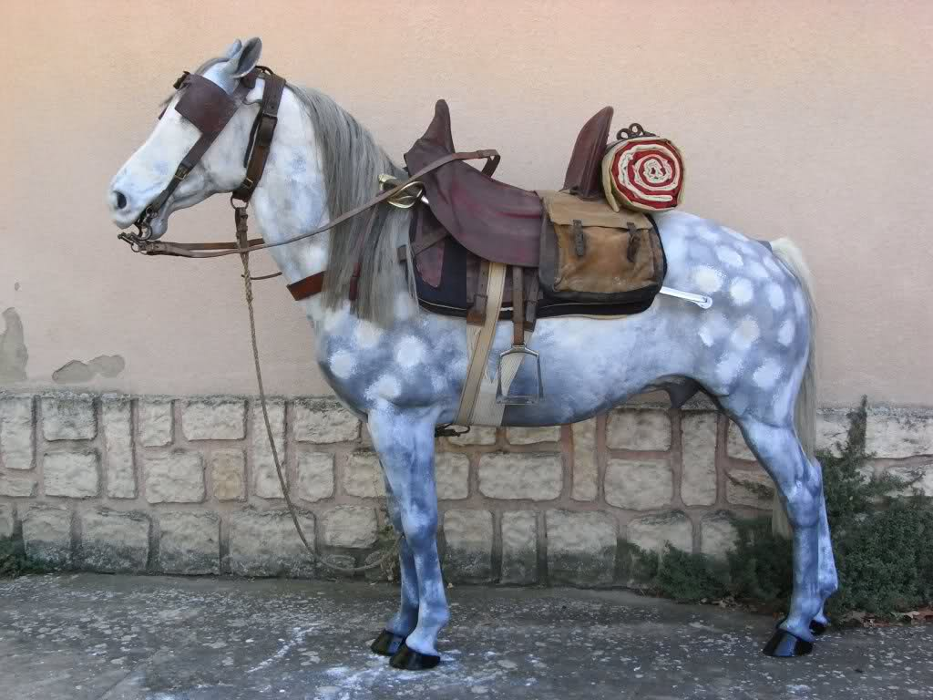 Cheval barbe gris perlé équipé d'un harnachement pour spahi